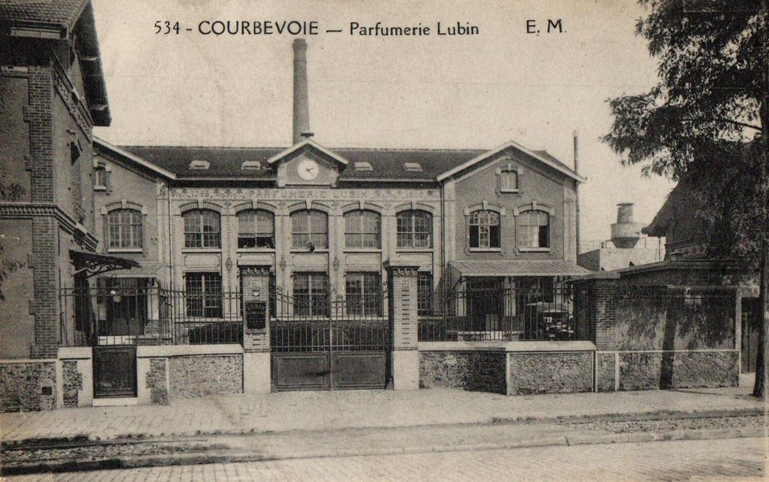 Courbevoie.Boulevard de Verdun.Parfumerie Lubin